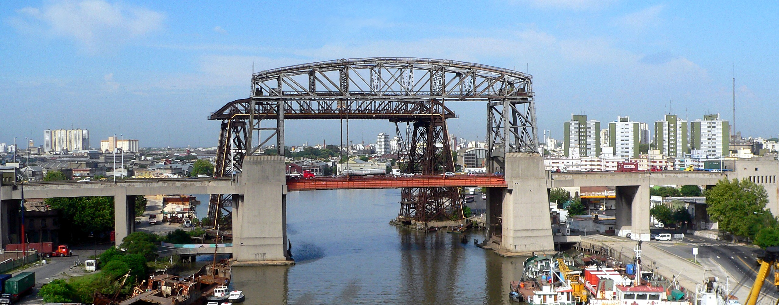 Puente Nicolás Avellaneda, Buenos Aires, ArgentinaP1000135